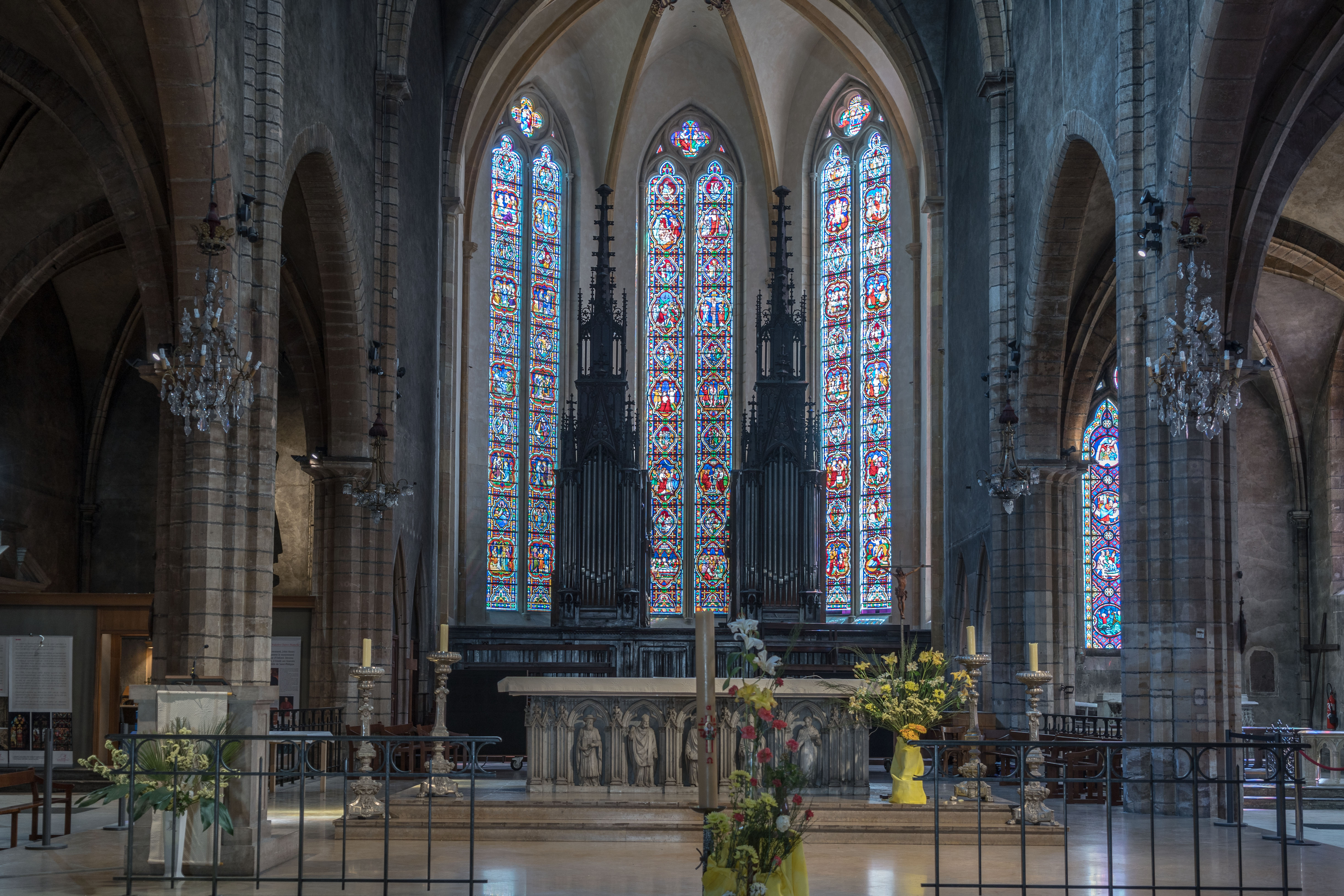 Lyon - église Saint-Bonaventure - Choeur et Orgue